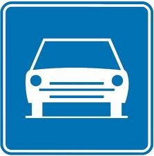 Dit is een verkeersbord voor autowegen aan te duiden in België